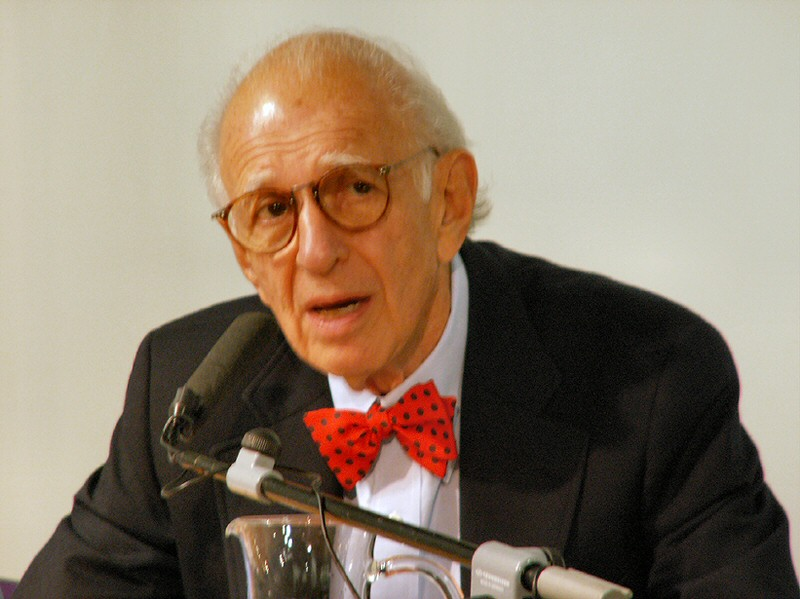 Eric Kandel bei der Veranstaltung 'Lange Nacht der Forschung' in Wien.